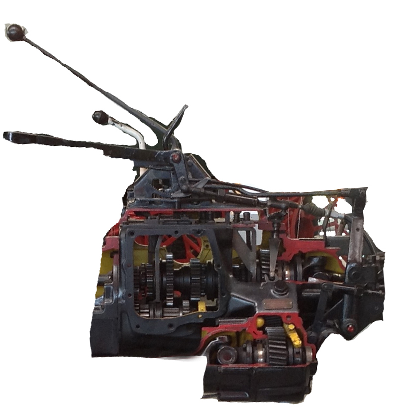 Unimoggetriebe UG1